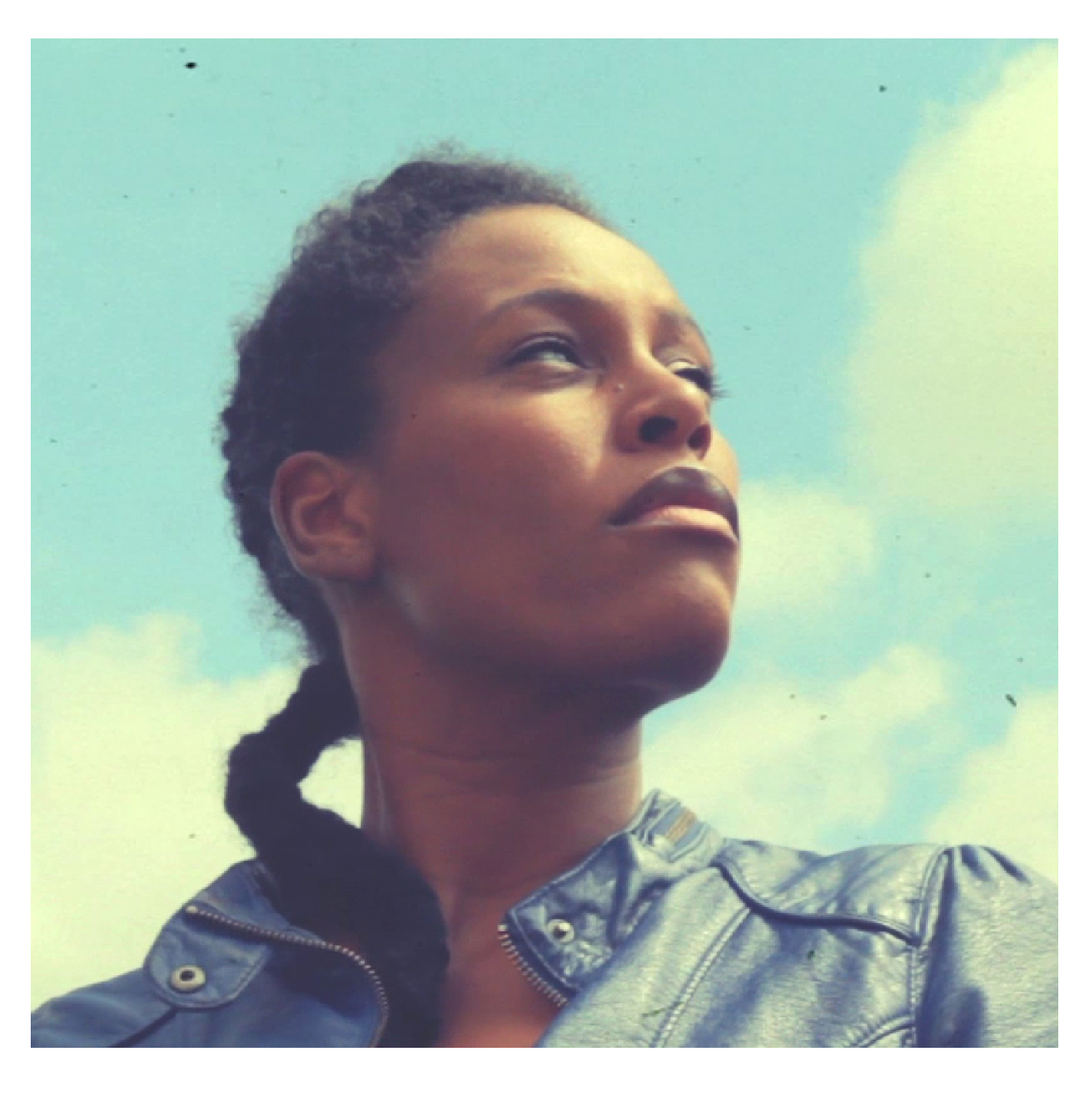 Sandra Nkaké en tournage pour le clip Bankrobber de Jî Drû en 2015